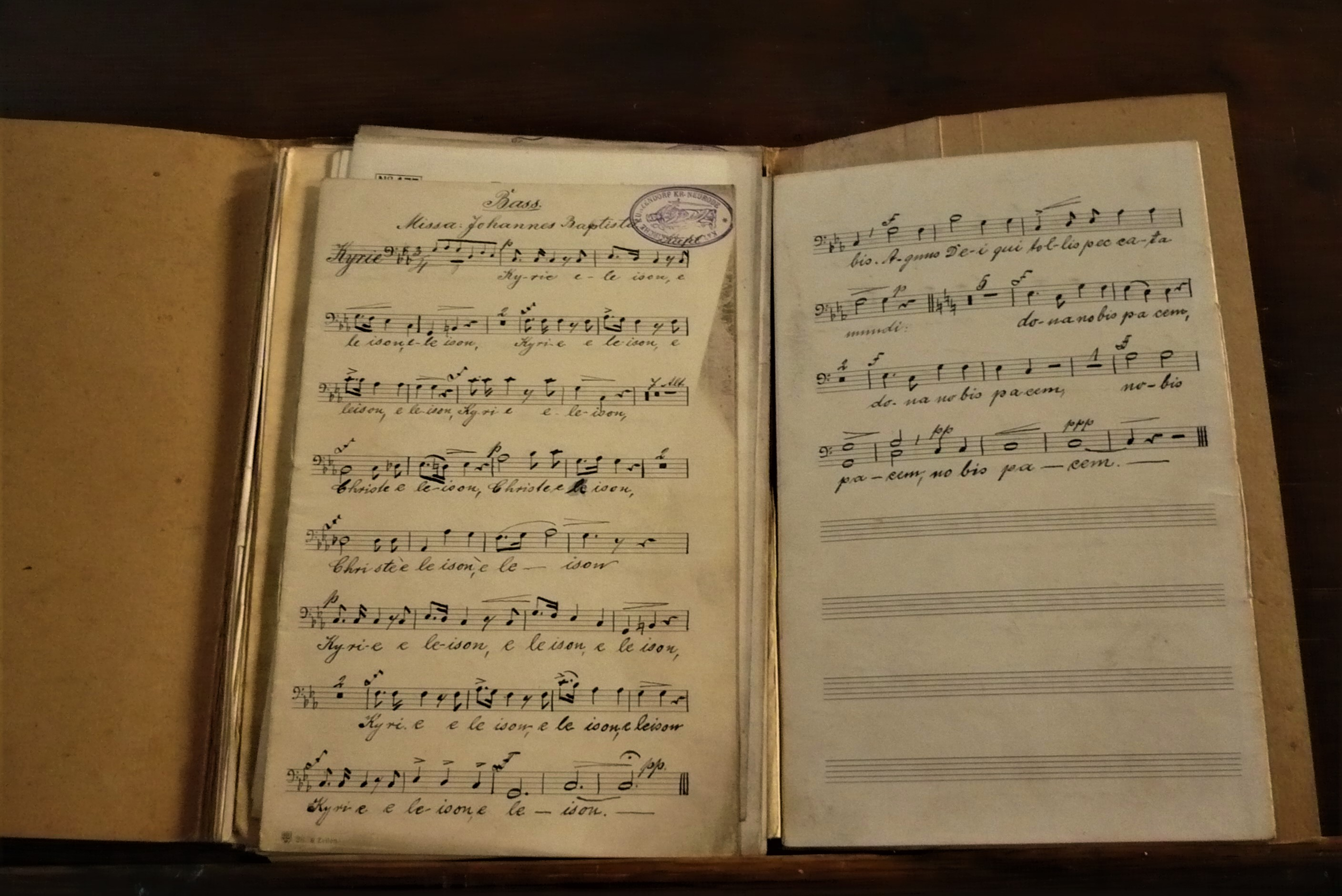 Kościół Barbary w Nowej Rudzie